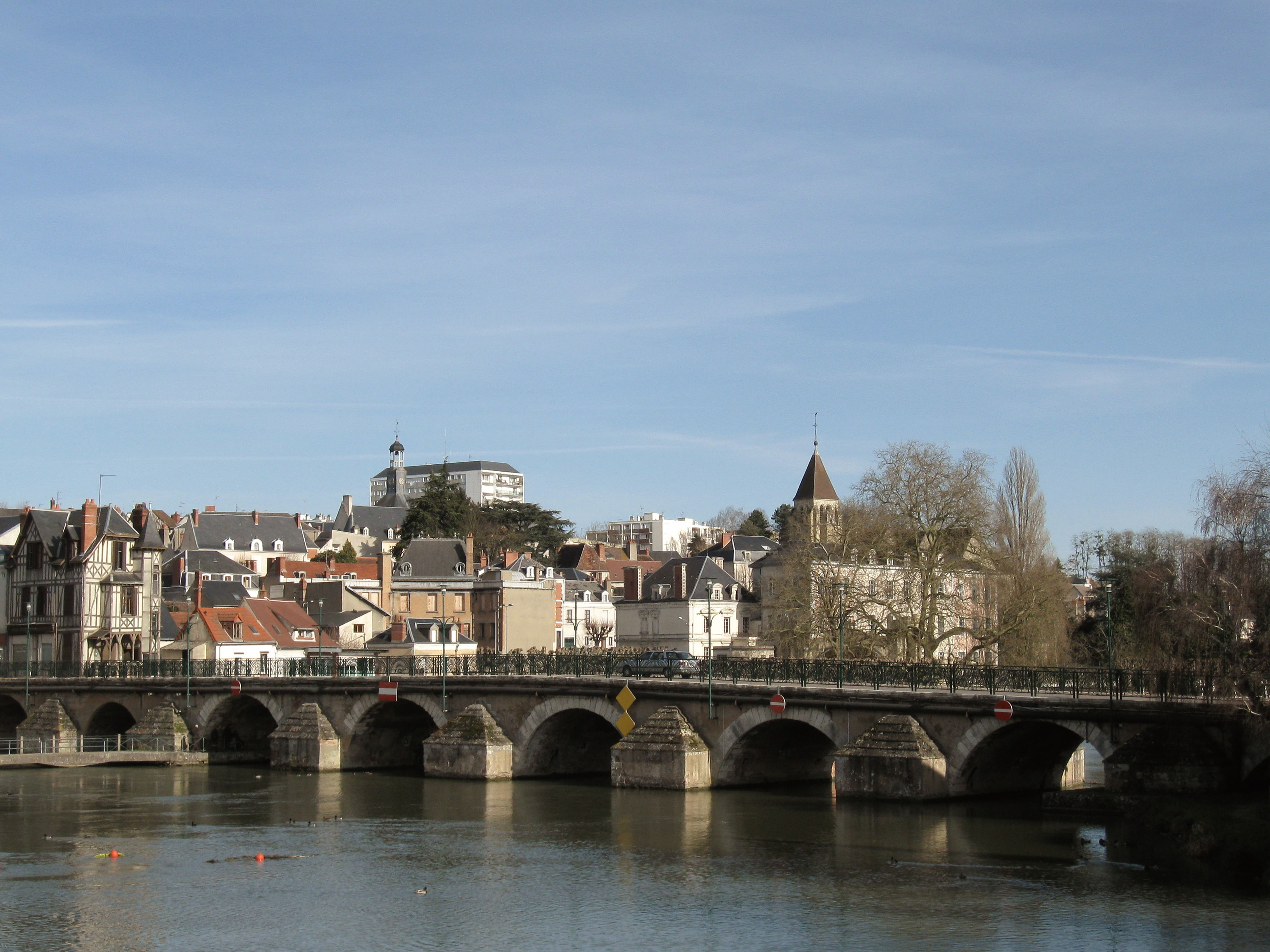 Pont sur le bassin central du canal de Berry et l'Yèvre, Vierzon, Cher, France